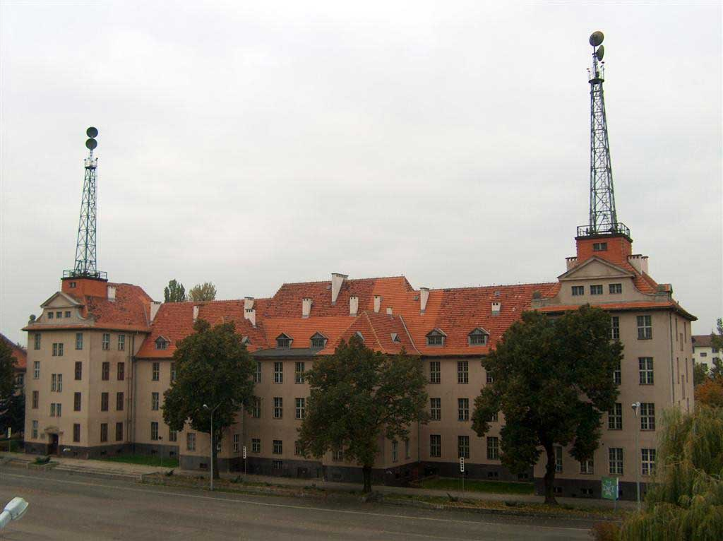 Centralny Ośrodek Szkolenia Wojsk Łączności w Legnicy